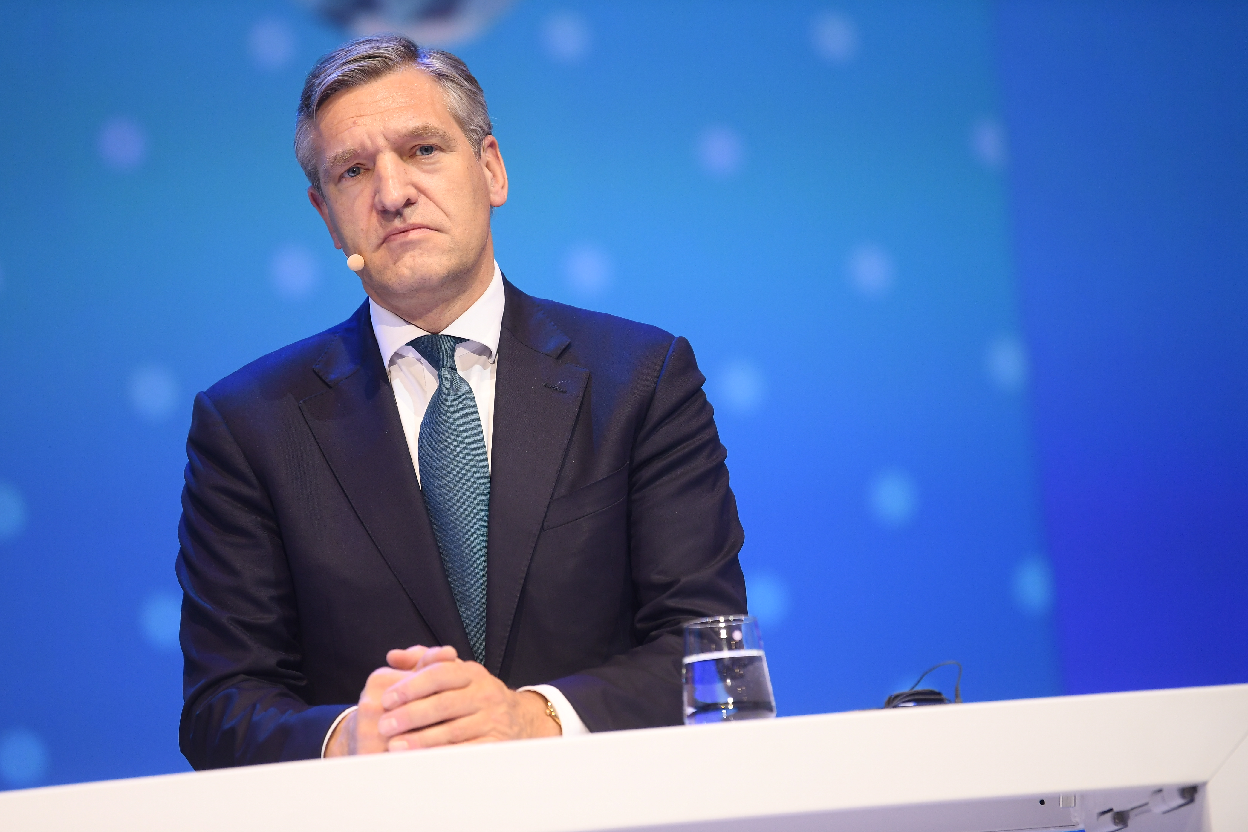 7 November 2018